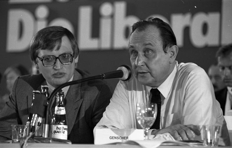 32. Ordentlicher Parteitag der FDP in der Halle 8 des Kölner Messegeländes.